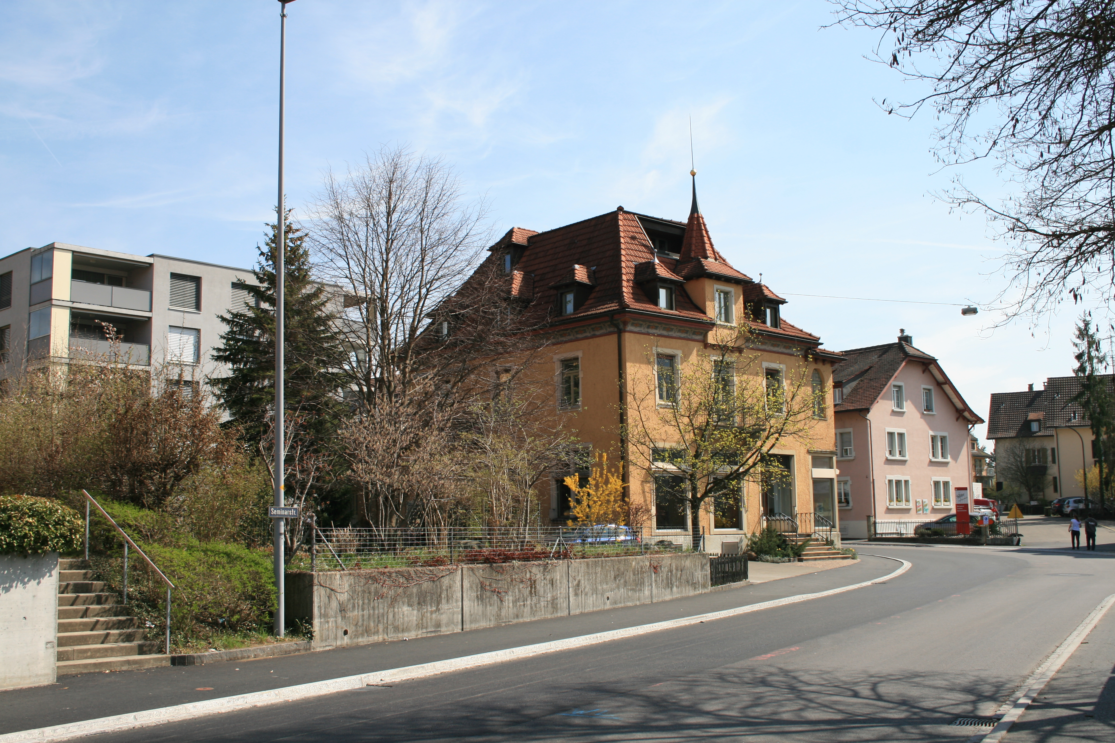 Alte Post